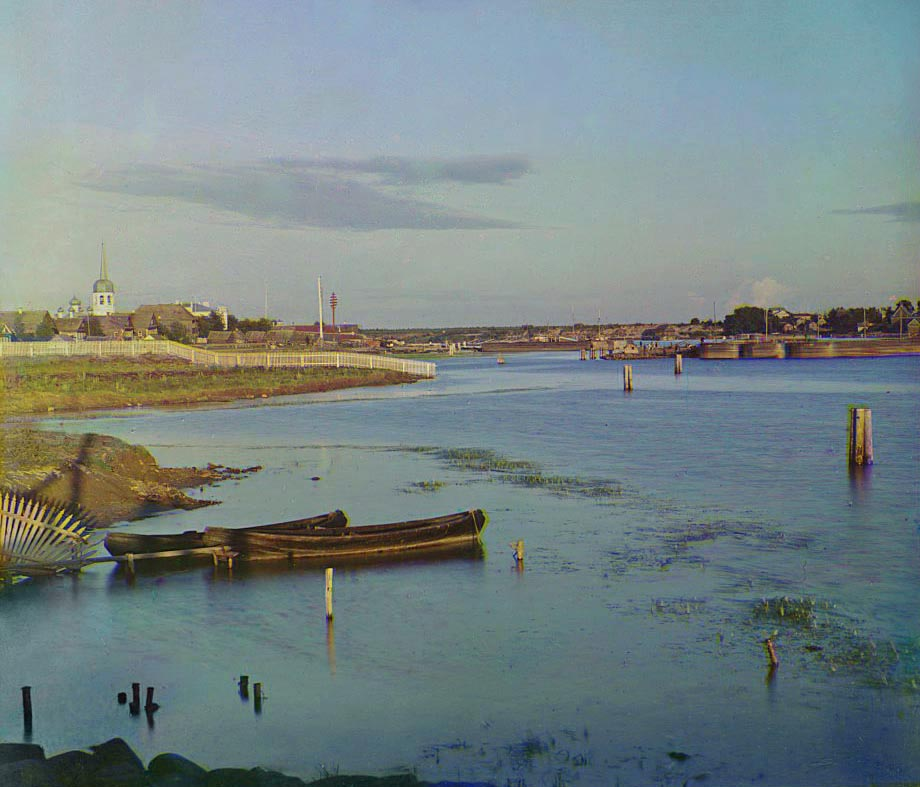 Syaskye Ryadki